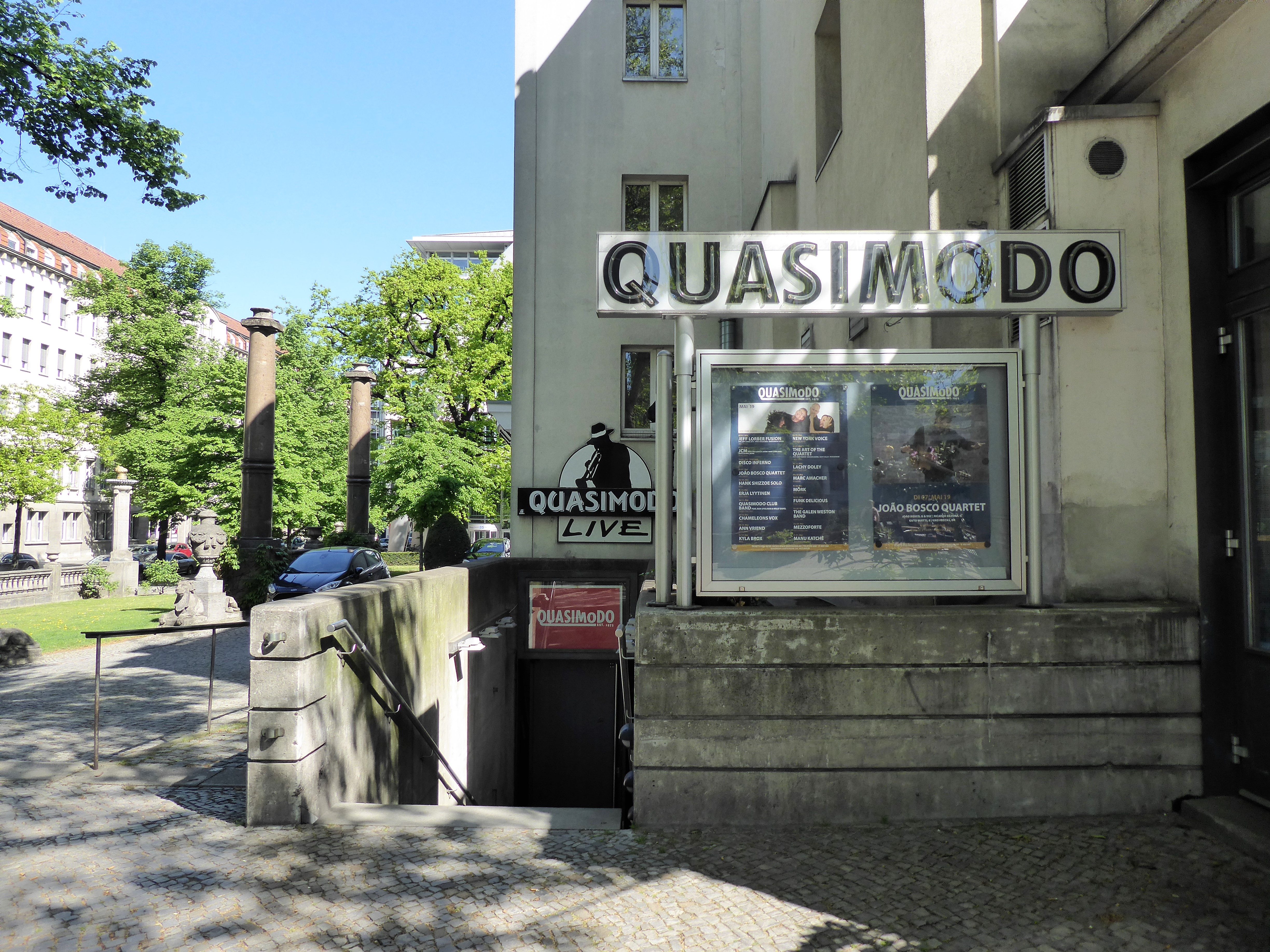 Eingang zum Jazzkeller Quasimodo Charlottenburg